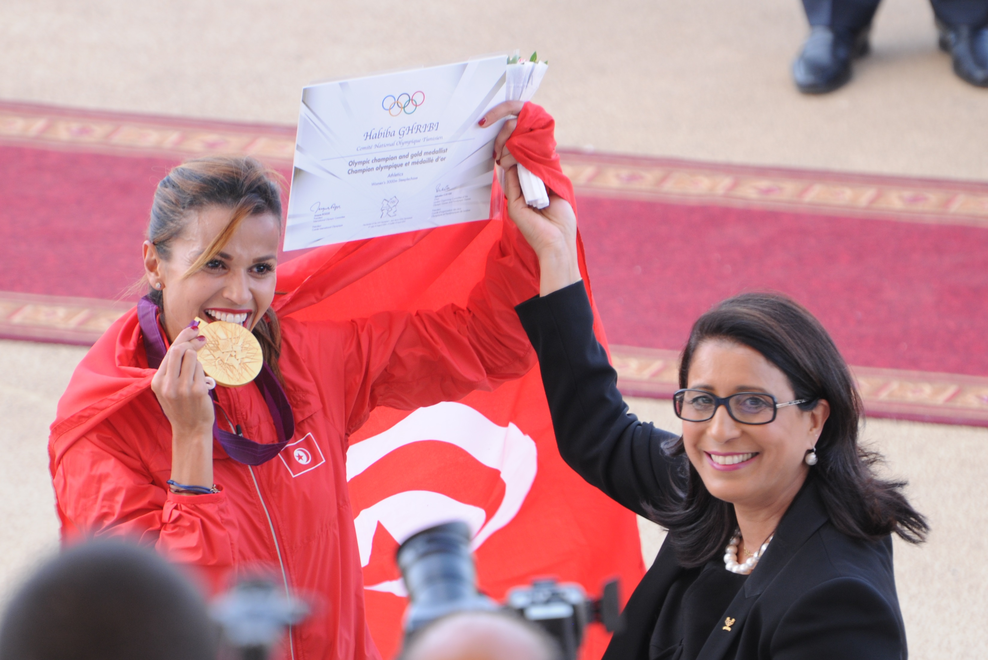 Habiba Ghribi et Nawal El Moutawakel lors de la cérémonie de remise de la médaille d'OR olympique, du 3000 steeple des JO de Londres 2012, le 4 juin 2016 au stade olympique d’Athlétisme de Radès.